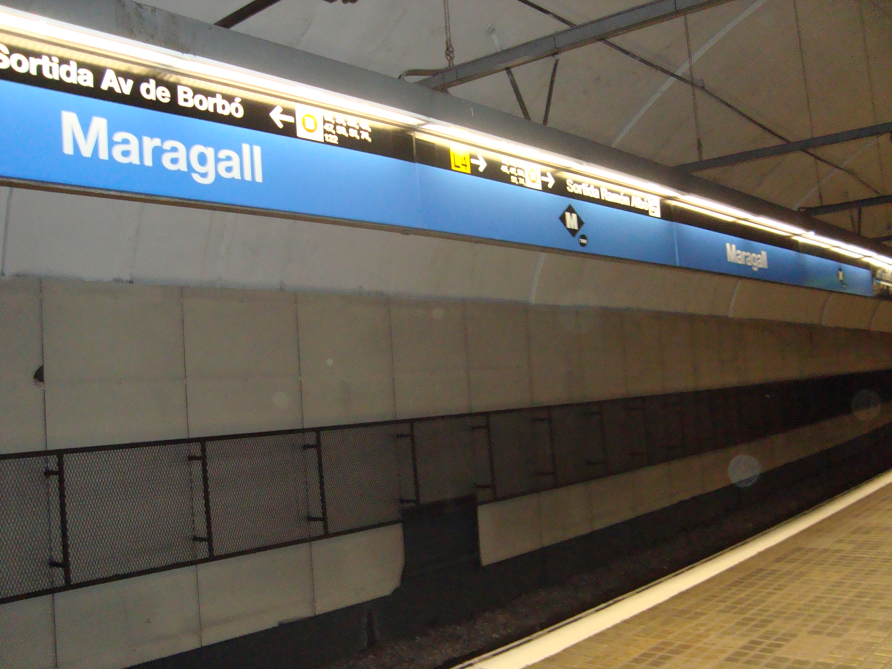 Estació de Maragall del metro de Barcelona.